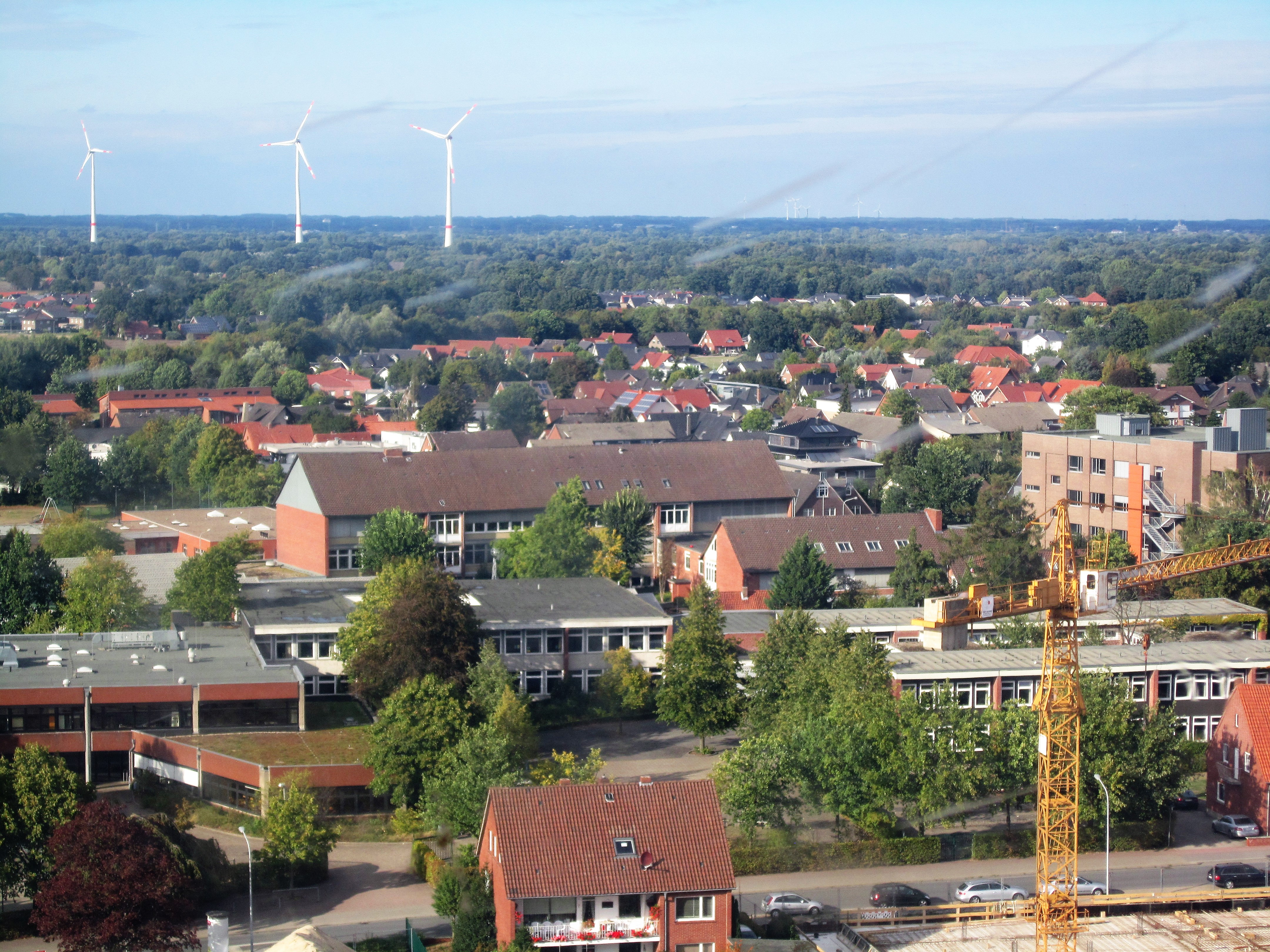 Norden von Lohne. Im Vordergrund das Schulzentrum; hinten links der Windpark Krimpenfort.